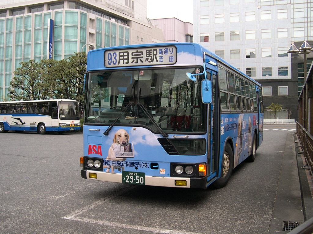 静岡駅前にて 2004-1-11 撮影